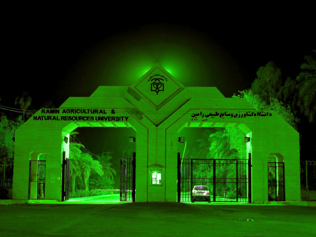 نمایی از سردر دانشگاه رامین در شب